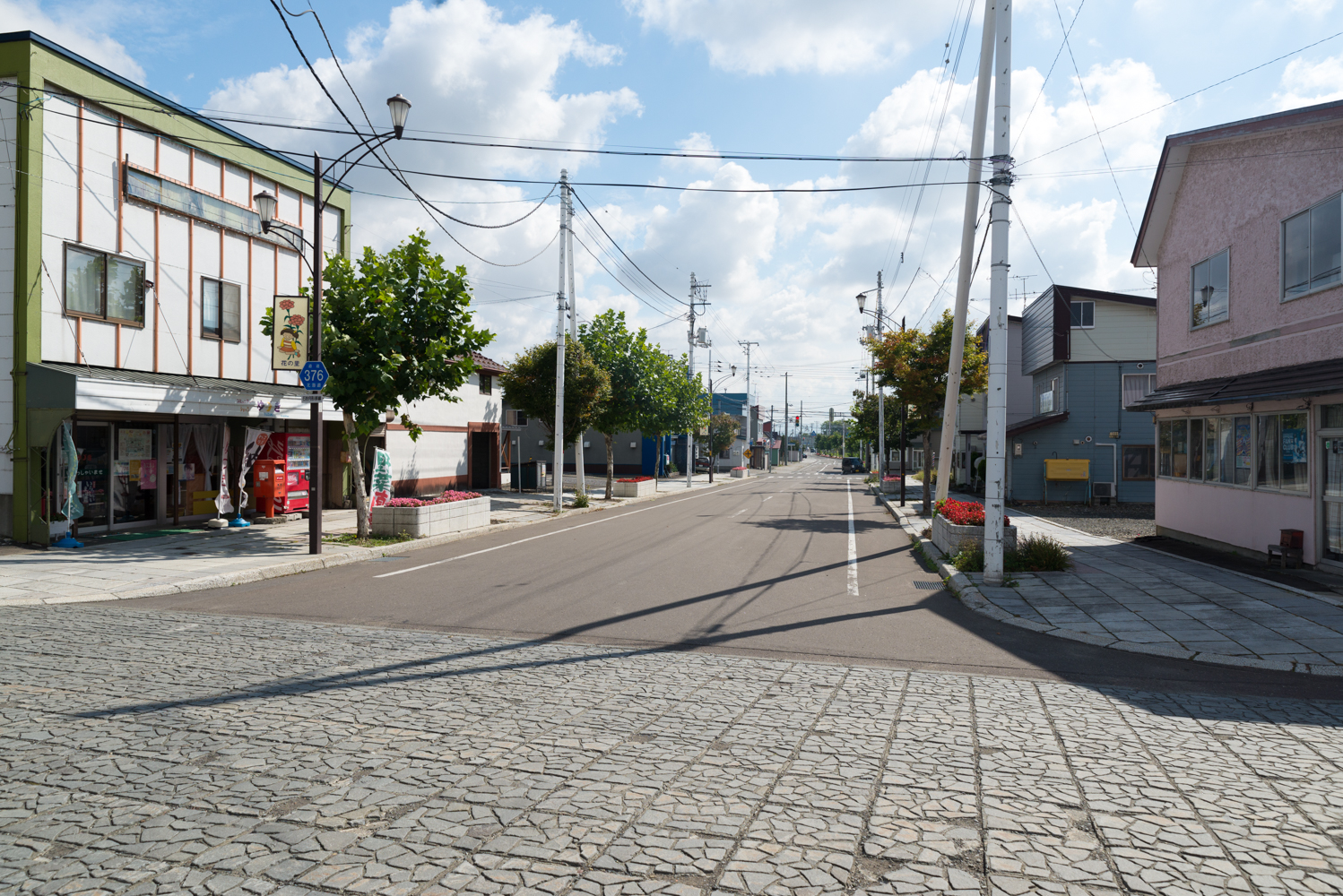 北海道旅客鉄道株式会社札沼線石狩月形駅駅前